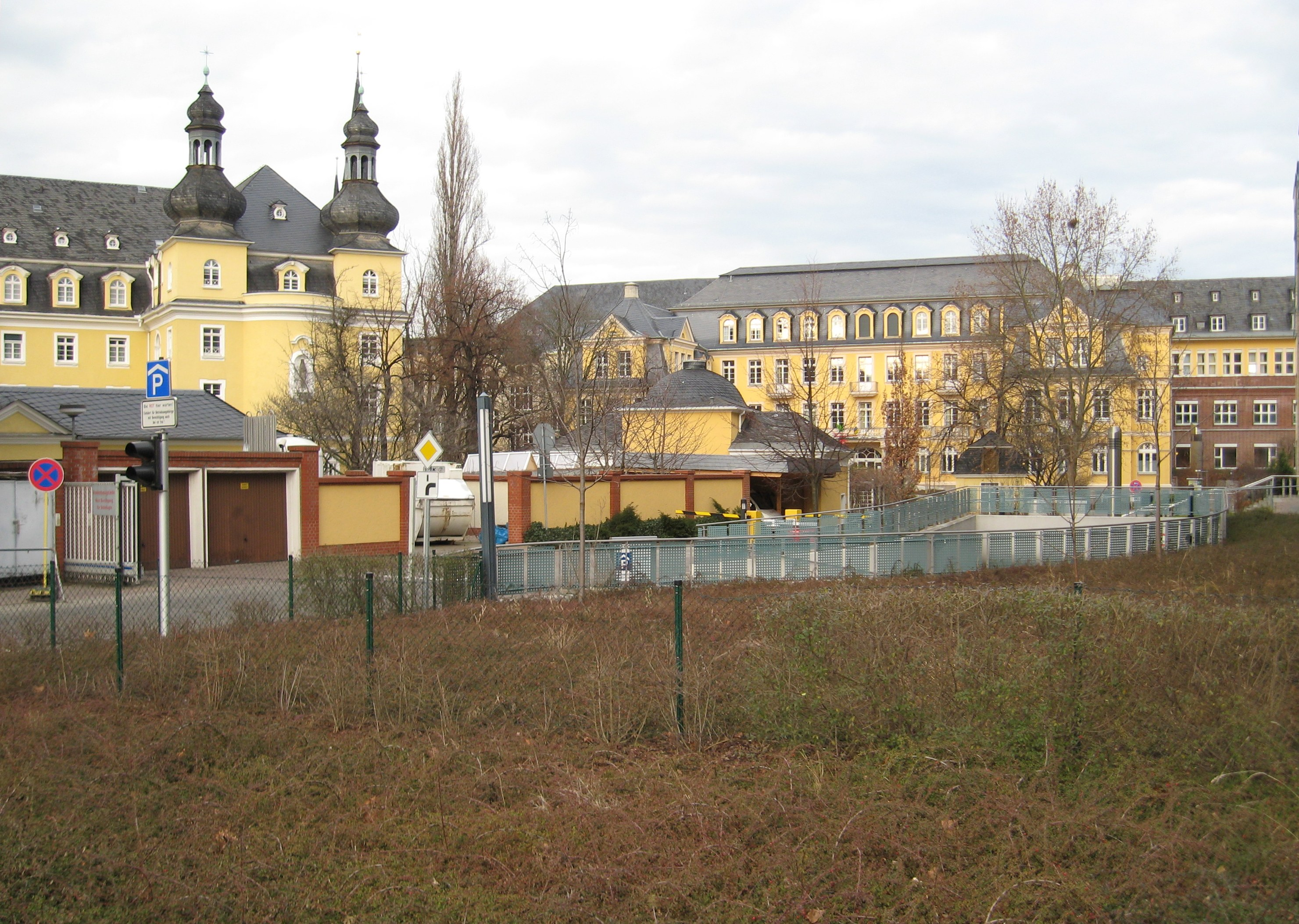 Das Krankenhaus St. Elisabeth und St. Barbara in Halle (Saale). - OpenStreetMap(Info)